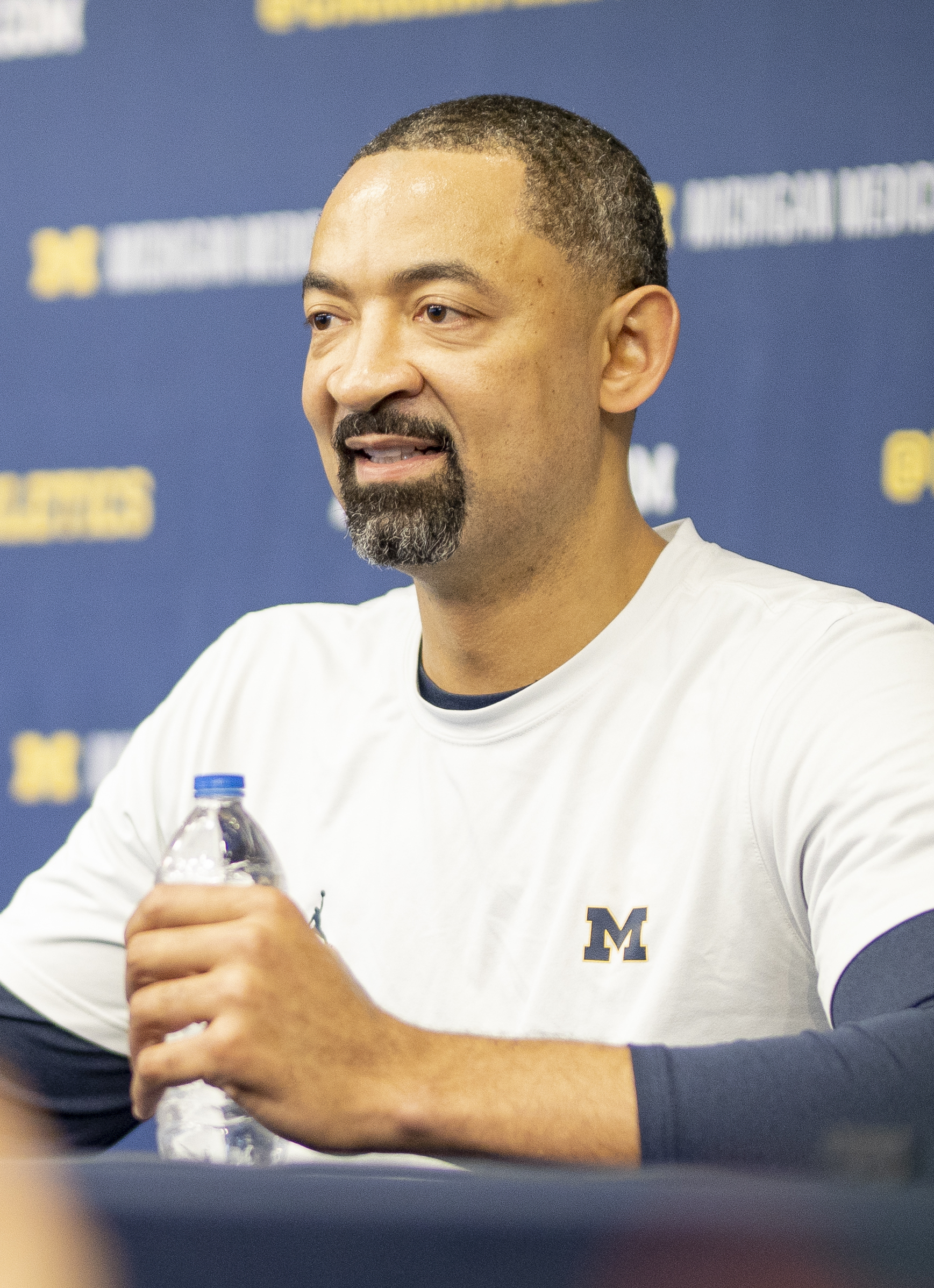 8V6A1595